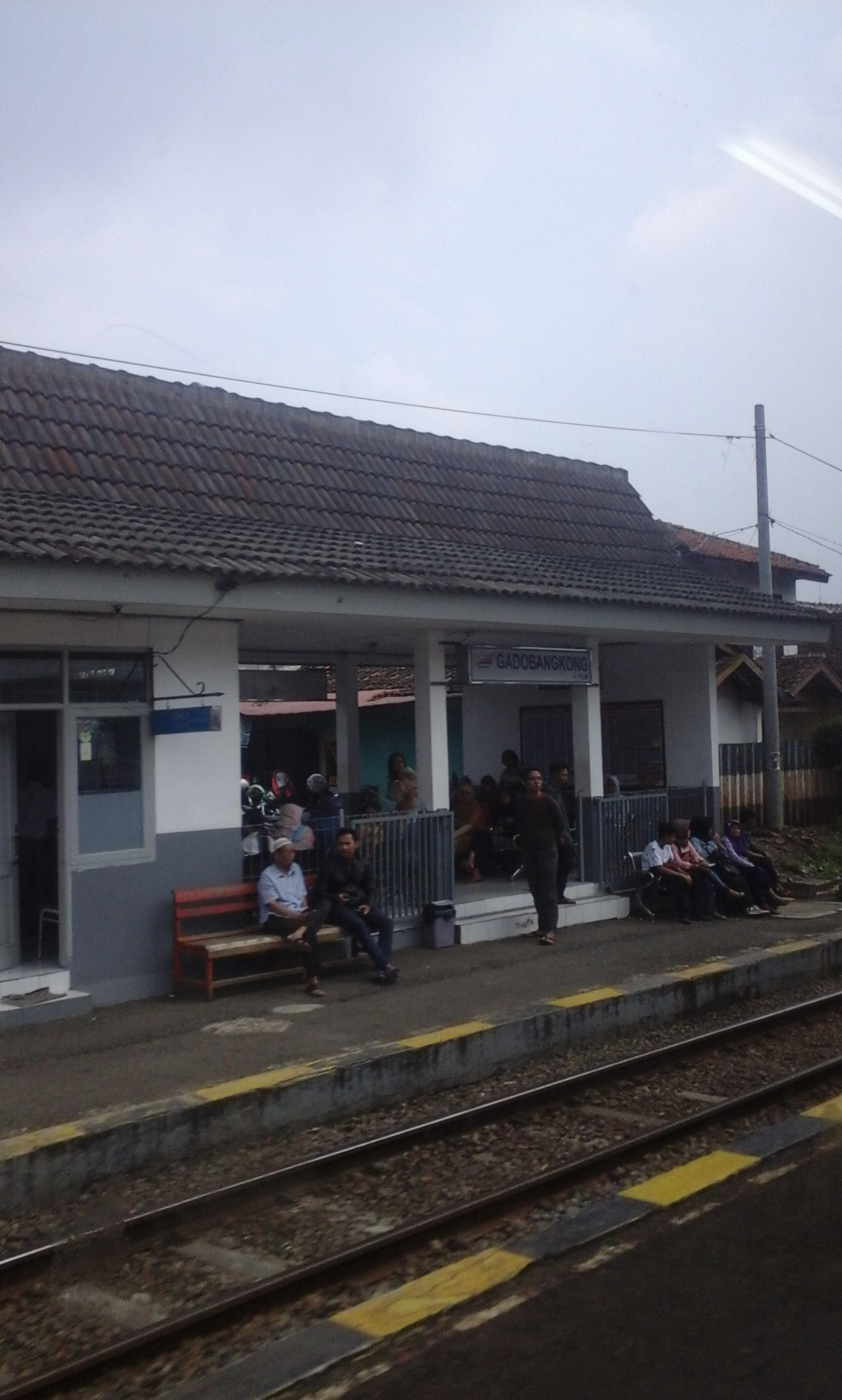 Stasiun Gadobangkong